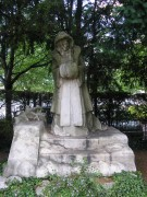 sculpture